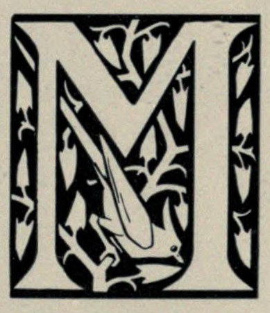 lettrine M avec oiseaux